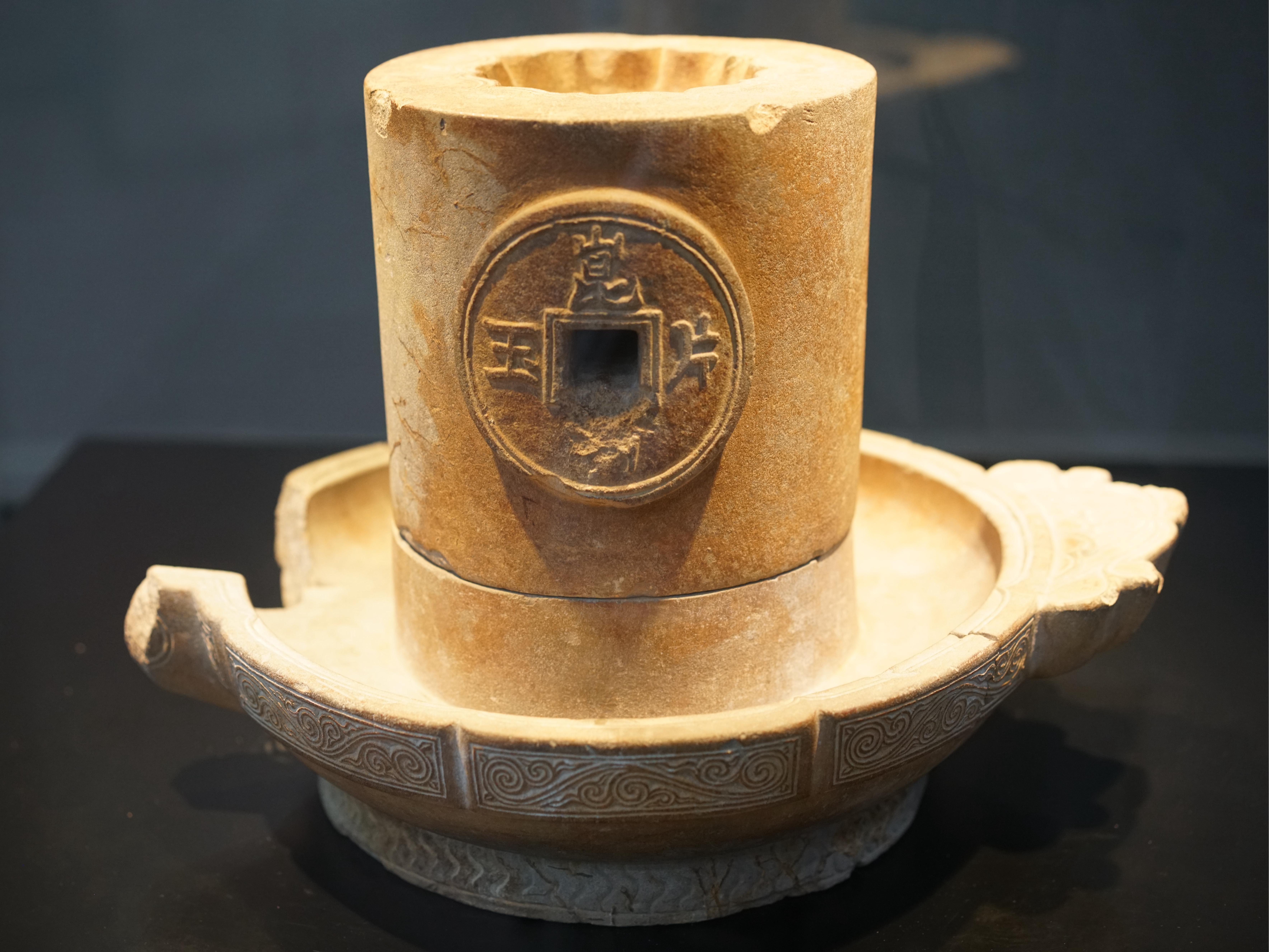 中文（中国大陆）: 昆山片玉石磨